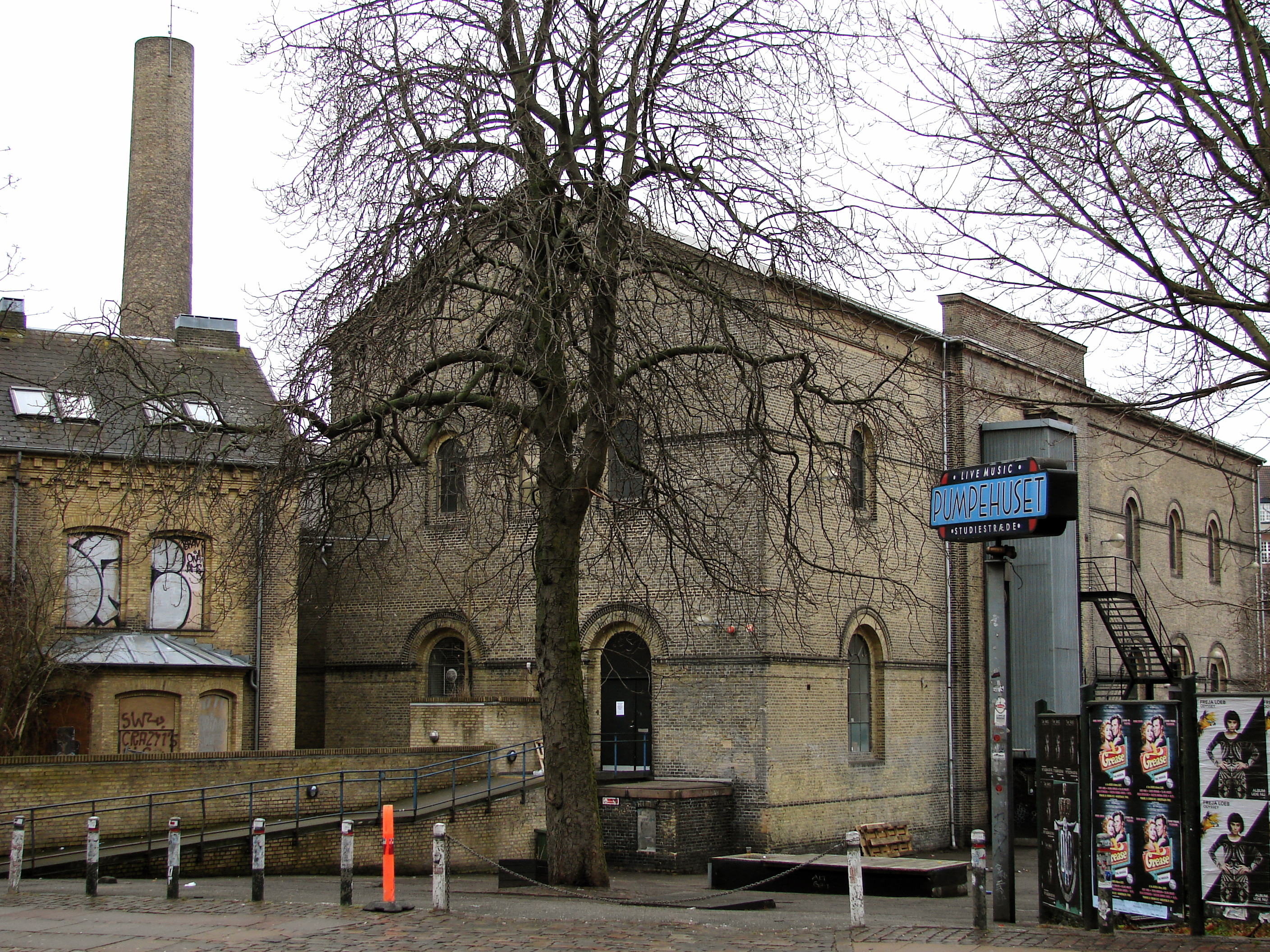 Koncertstedet Pumpehuset i København